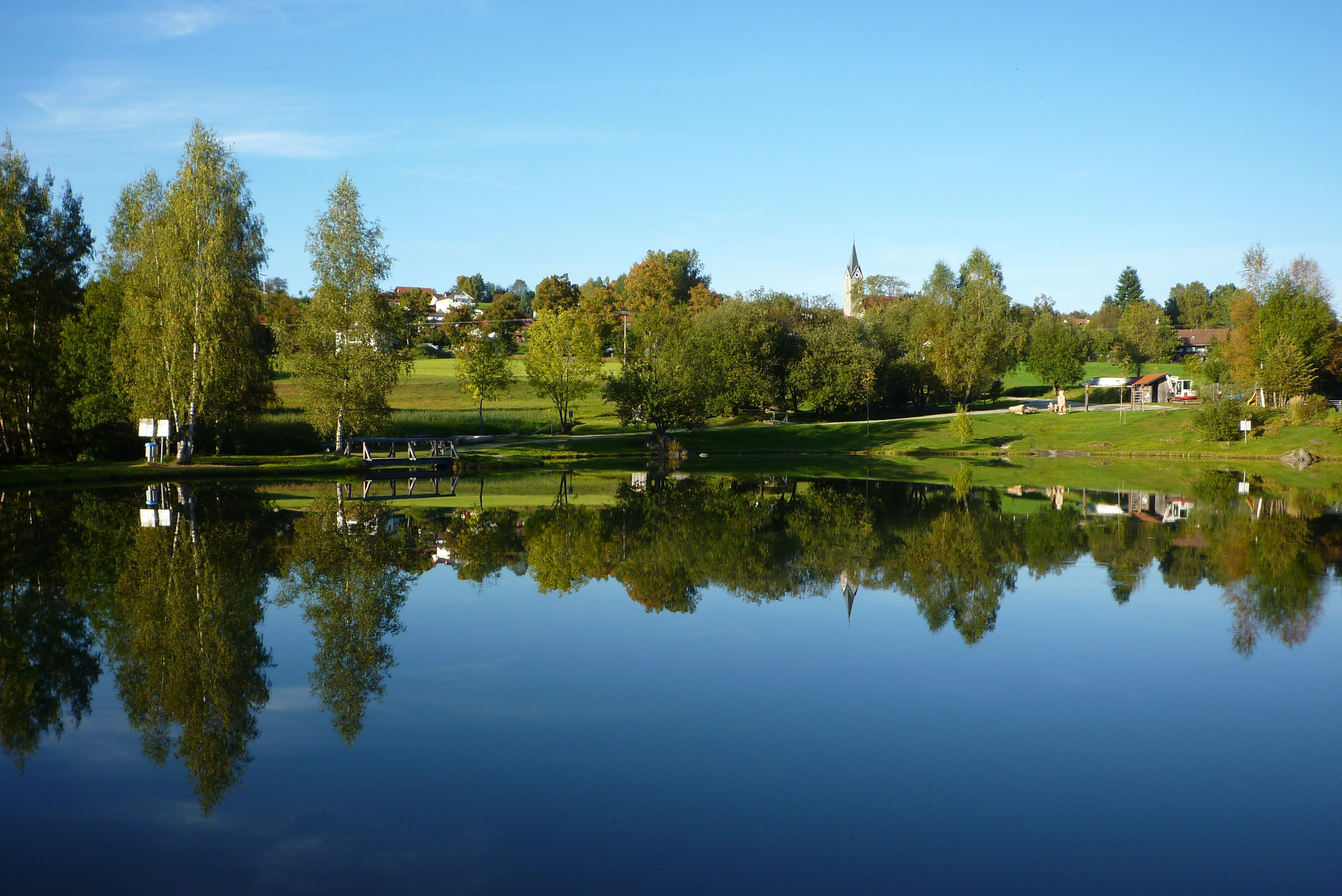 Neuschönau - Badesee mit Blick auf den Ort